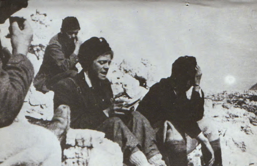 Srpskohrvatski / српскохрватски: Ivan Goran Kovačić recituje svoju poeziju saborcima.